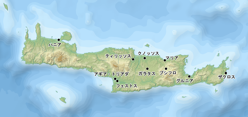 クレタ島にある主要なミノア文明時代の遺跡の位置と名前。 File:Greece (ancient) Crete (relief-cropped).pngをベースに、周藤芳幸 (October 2003) "第2章 ミュケナイ文明とエーゲ海の初期王権" in 古代王権の誕生Ⅳ ヨーロッパ篇, 角川書店, pp. 17 ISBN: 978-4-04-523004-2. 、図1及びGoogle Mapを参考に作成。